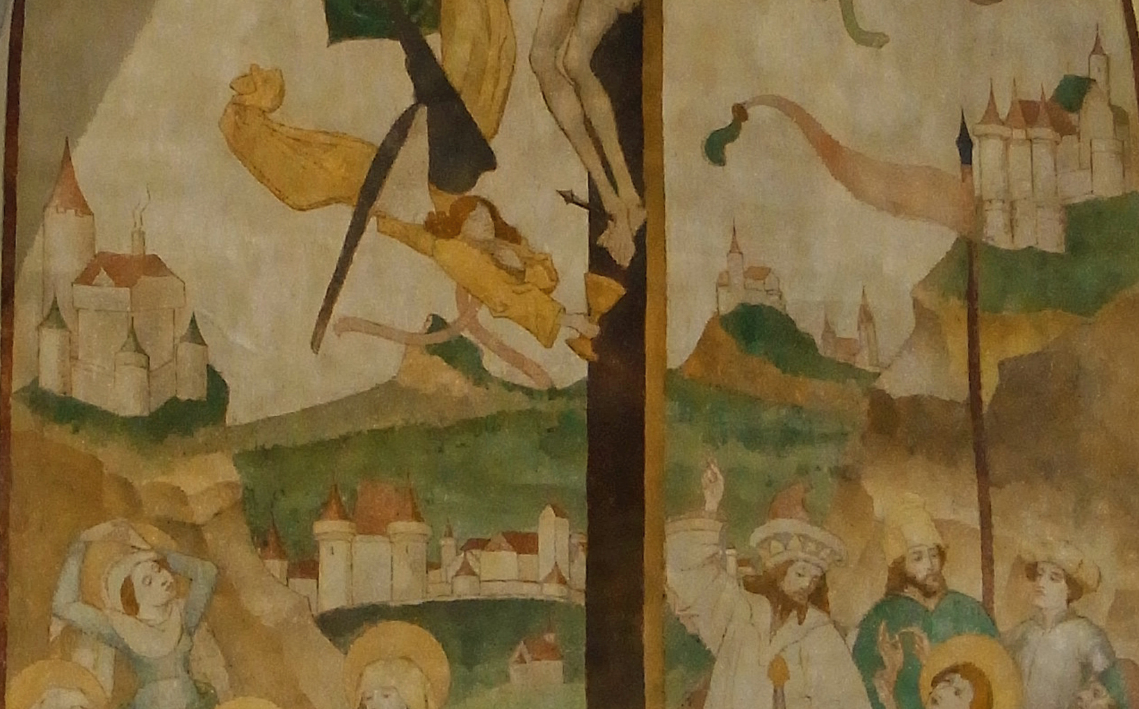 Engstlatt Peterskirche Spätgotisches Gemälde um 1471 Detail: Die Landschaft im Hintergrund wird als Darstellung der Zollernalb gedeutet, mit Balingen, der Lochen, der Burg Hohenzollern und der Schalksburg